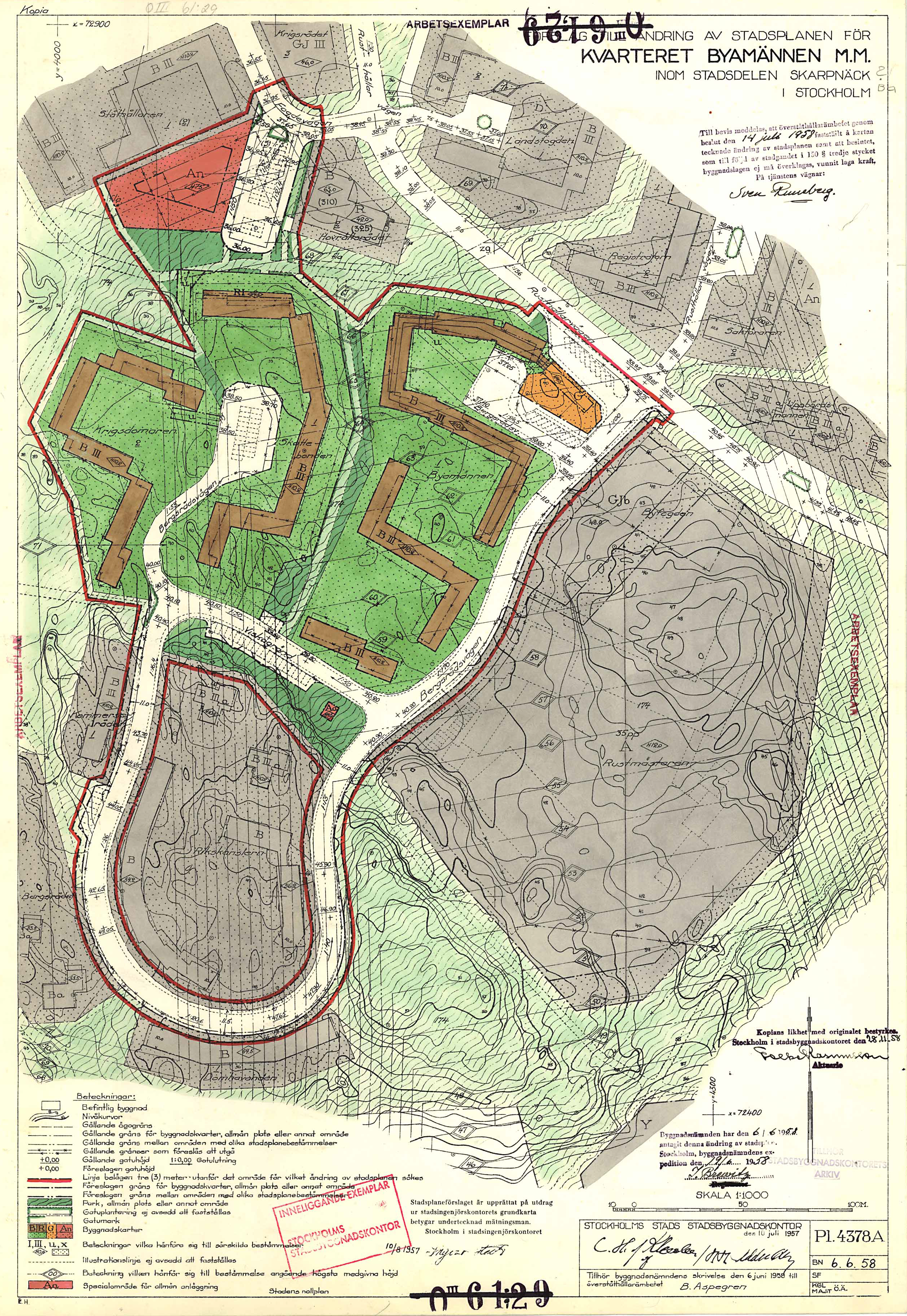 Stadsplan över del av Bagarmossen